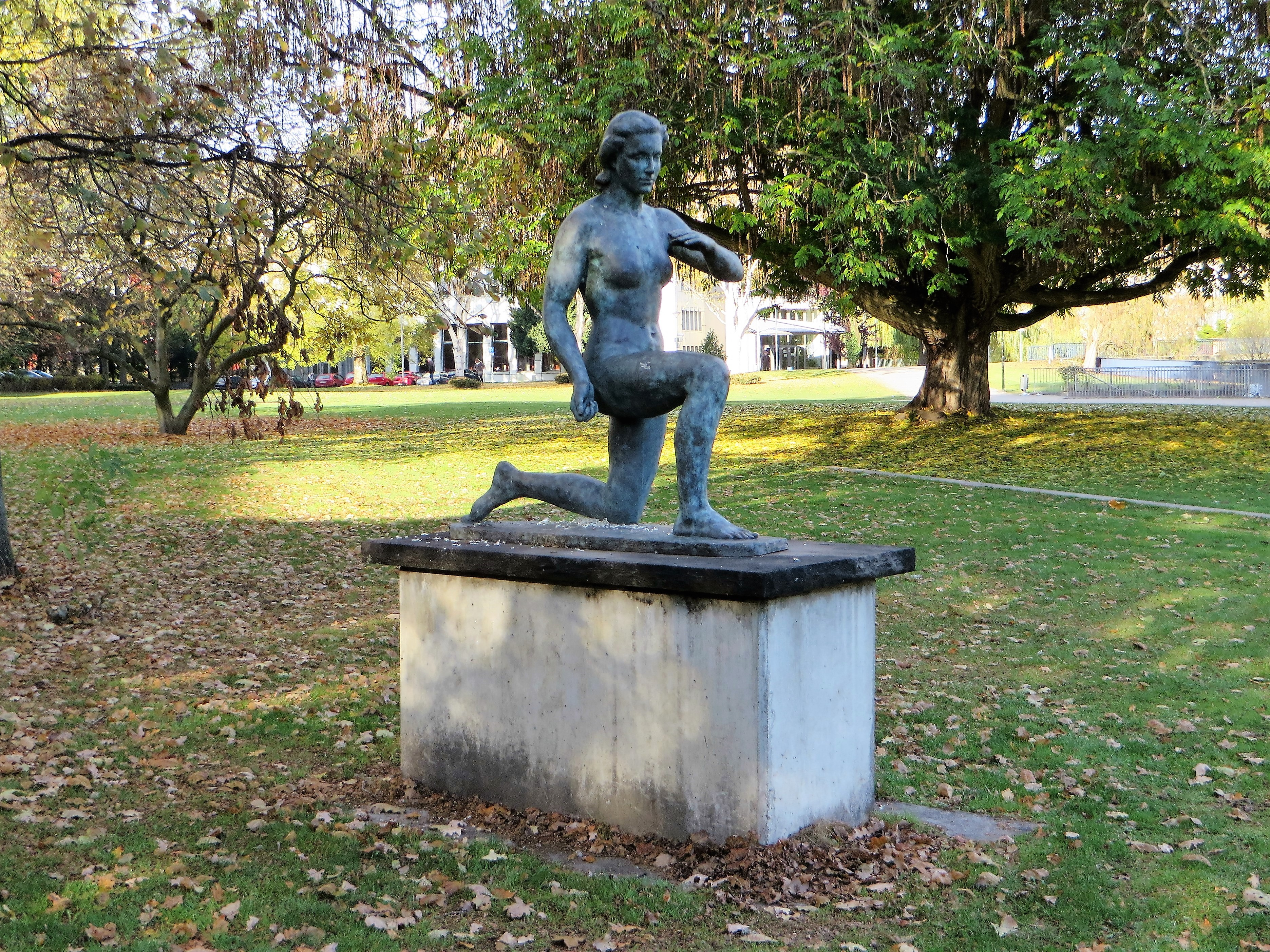 Bronze-Skulptur „Kniende“ im Hagener Volmepark. Die 147 cm hohe Plastik steht auf einem Sockel in der Grünfläche vor der als Naturdenkmal geschützten Flügelnuss (Hintergrund rechts). Die auch als „Nymphenfigur“ bezeichnete Skulptur wurde 1938 von dem Bildhauer Ivo Beucker erschaffen.